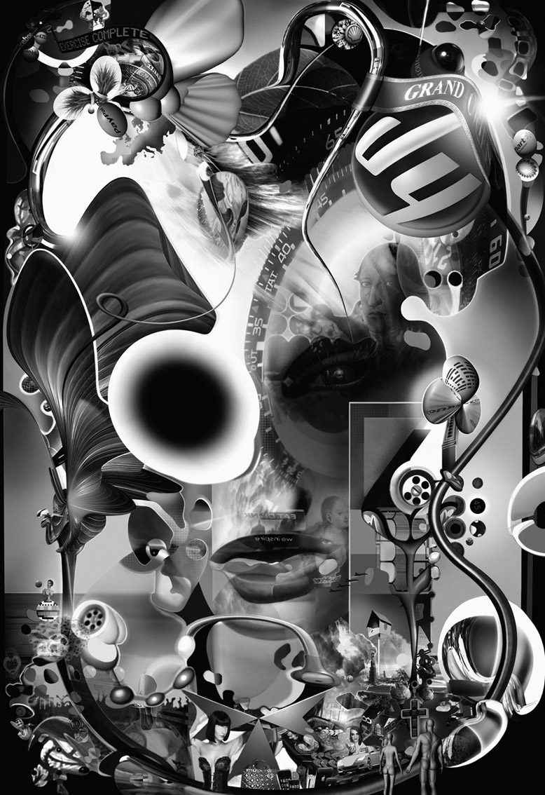 Wiki-Jack is watching you! Ein Werk von Martin Denker aus dem Jahre 2011